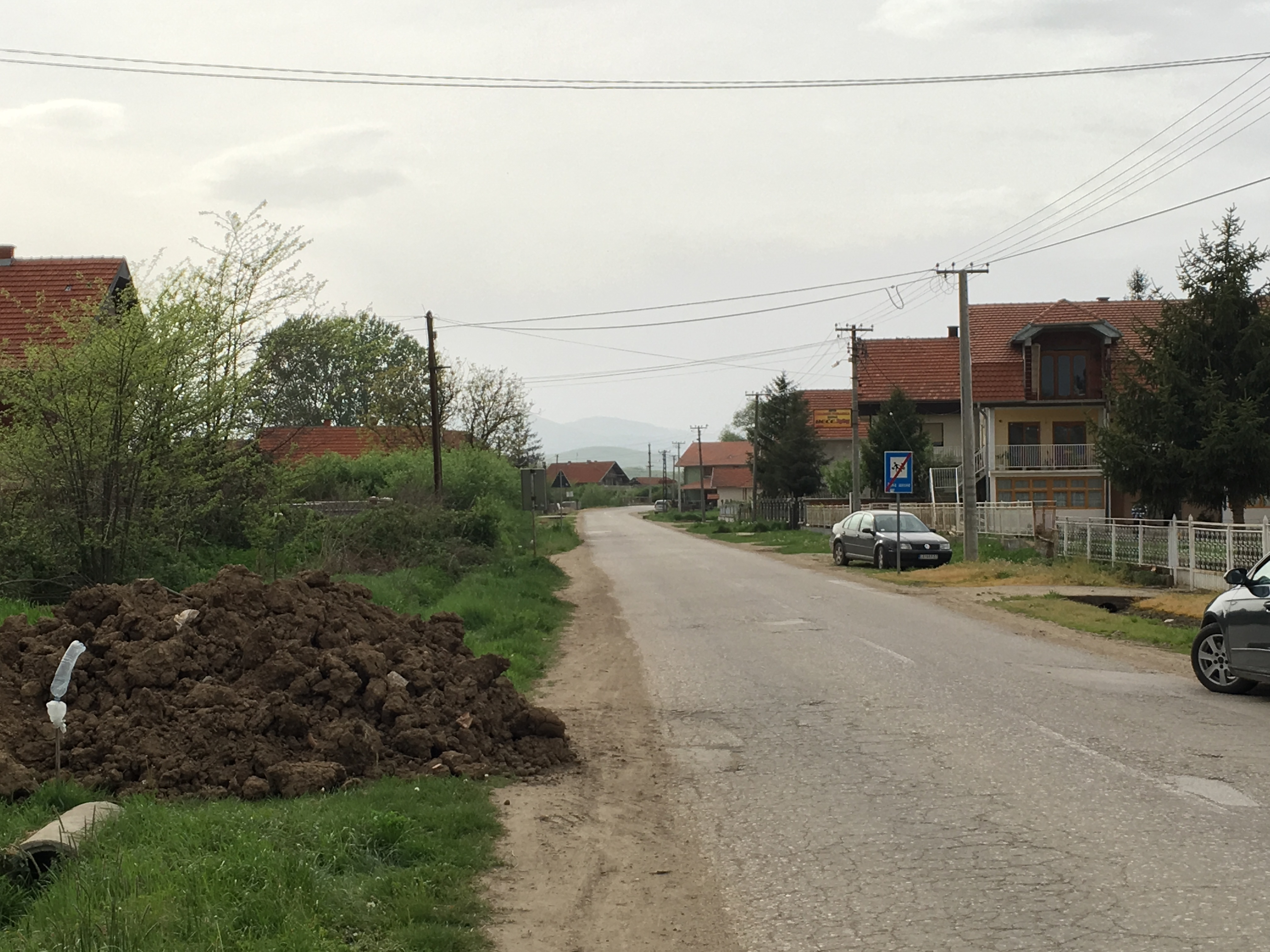 Srpski (latinica): Pridvorica, Leskovac